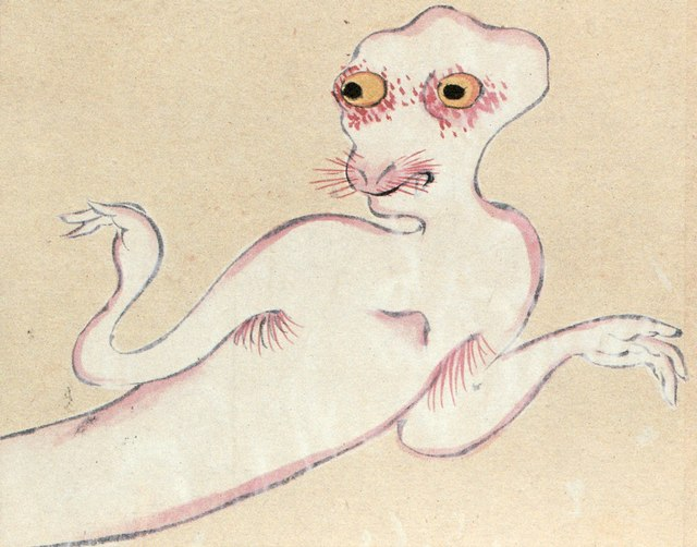 Shiroukari (白うかり) from the Hyakki-Yagyō-Emaki (百鬼夜行絵巻)